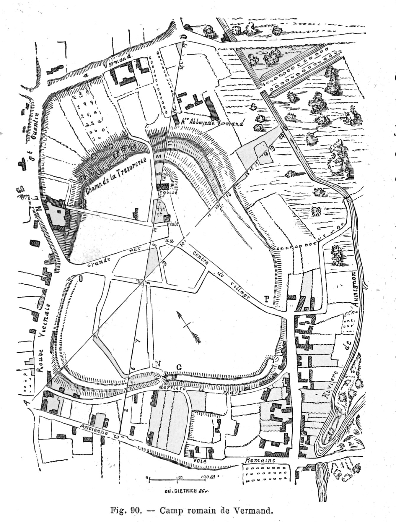 image extraite de "Antiquités et monuments du département de l'Aisne".